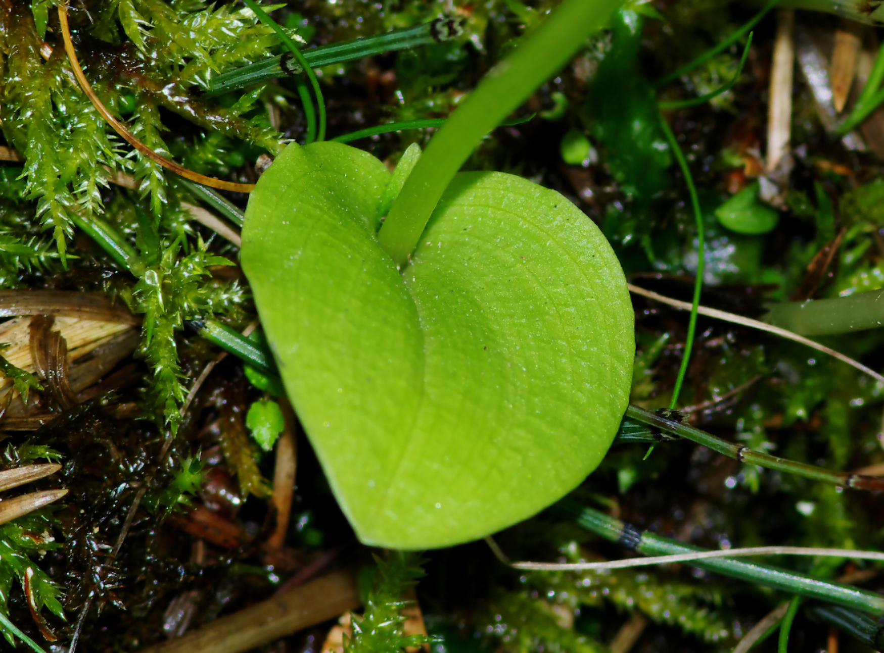 Wyblin jednolistny (Malaxis monophyllos) - Młaki nad Pogorią I w Dąbrowie Górniczej.